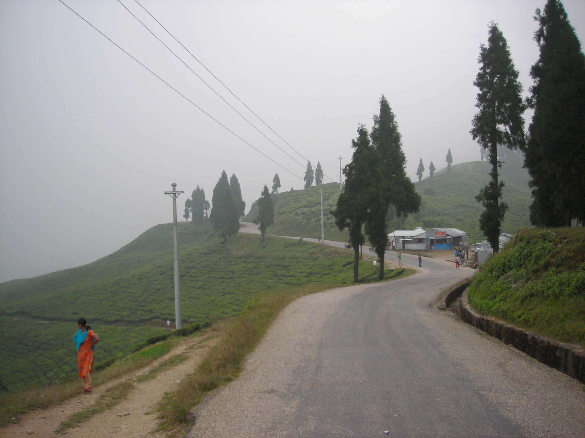 नेपाली: कन्याम चियाबगान